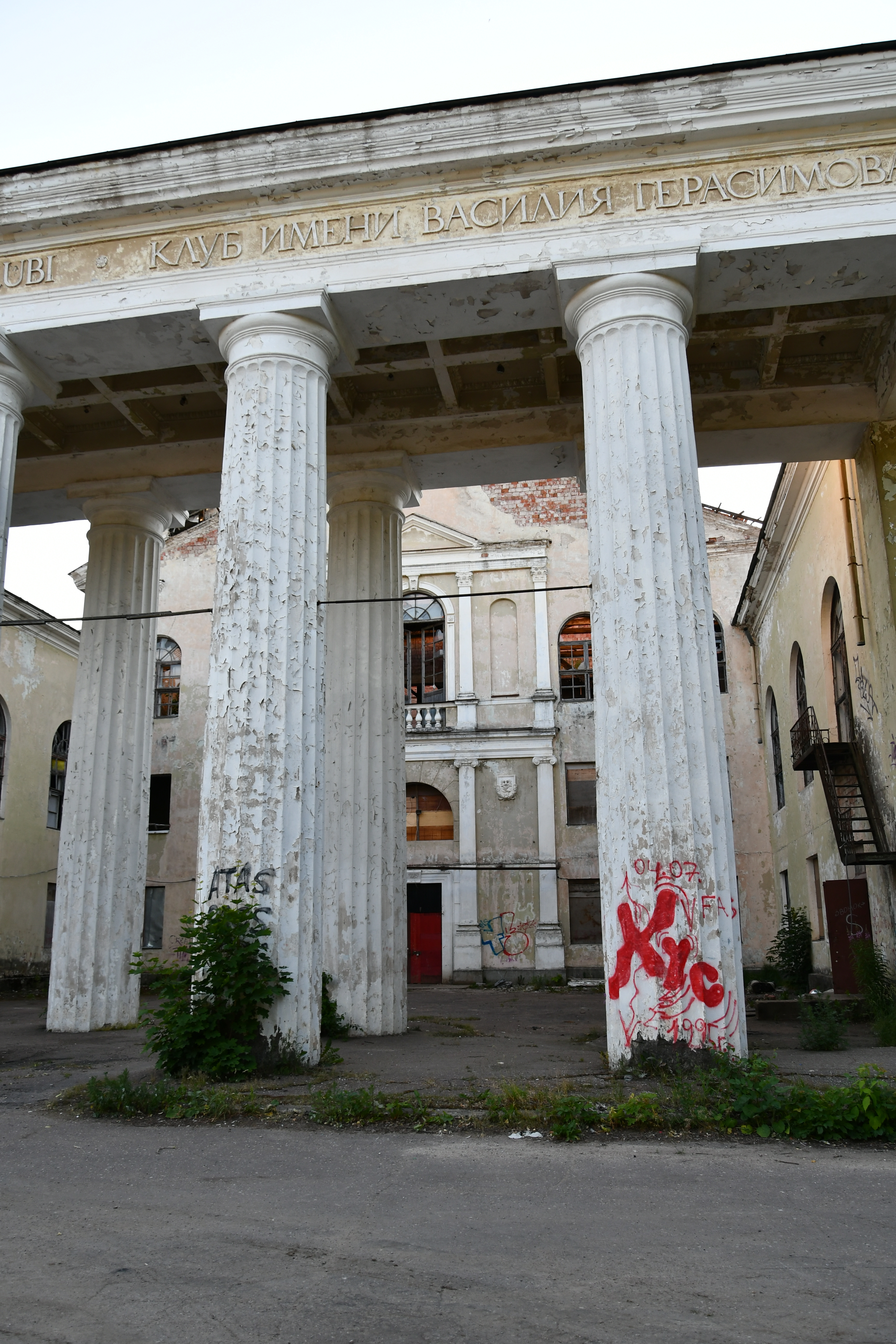 Vassili Gerassimovi nimelise kultuuripalee aatriumi fragment aasta 2020 suvel